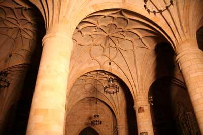 Bóvedas de la Colegiata de San Pedro (Soria)